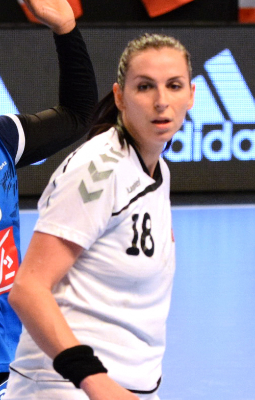 Laurisa Landre ,le 29 novembre 2015, lors du match France / République Tchèque pour le compte du TIPIFF 2015. Au stade Pierre de Coubertin à Paris.